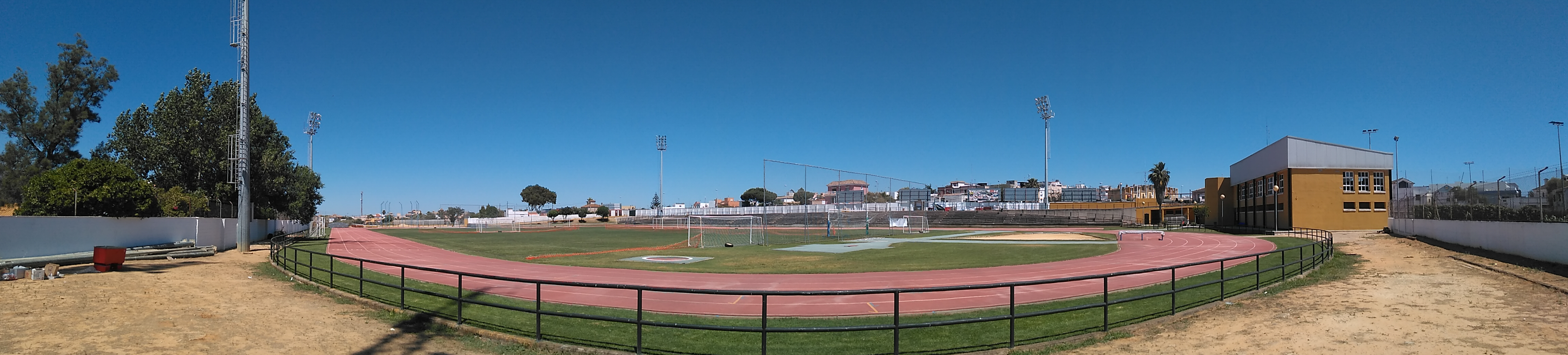 Campo De Fútbol El Picacho (Sanlúcar de Barrameda, España).